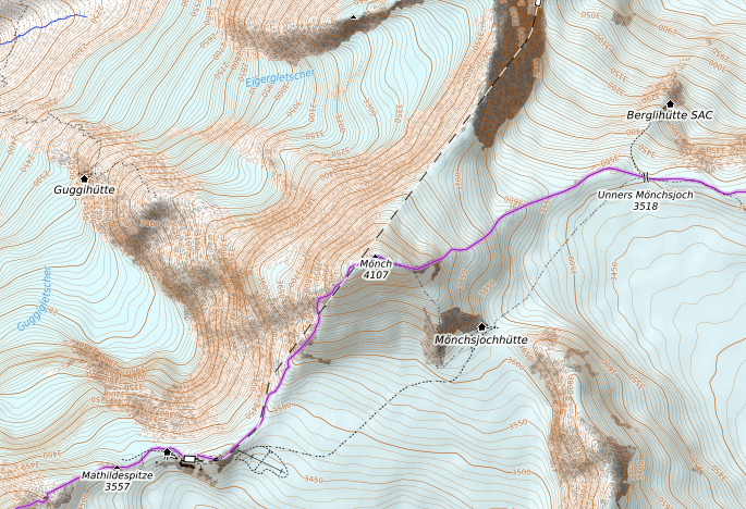 carte réalisée sur umap This map may be incomplete, and may contain errors. Don't rely solely on it for navigation.